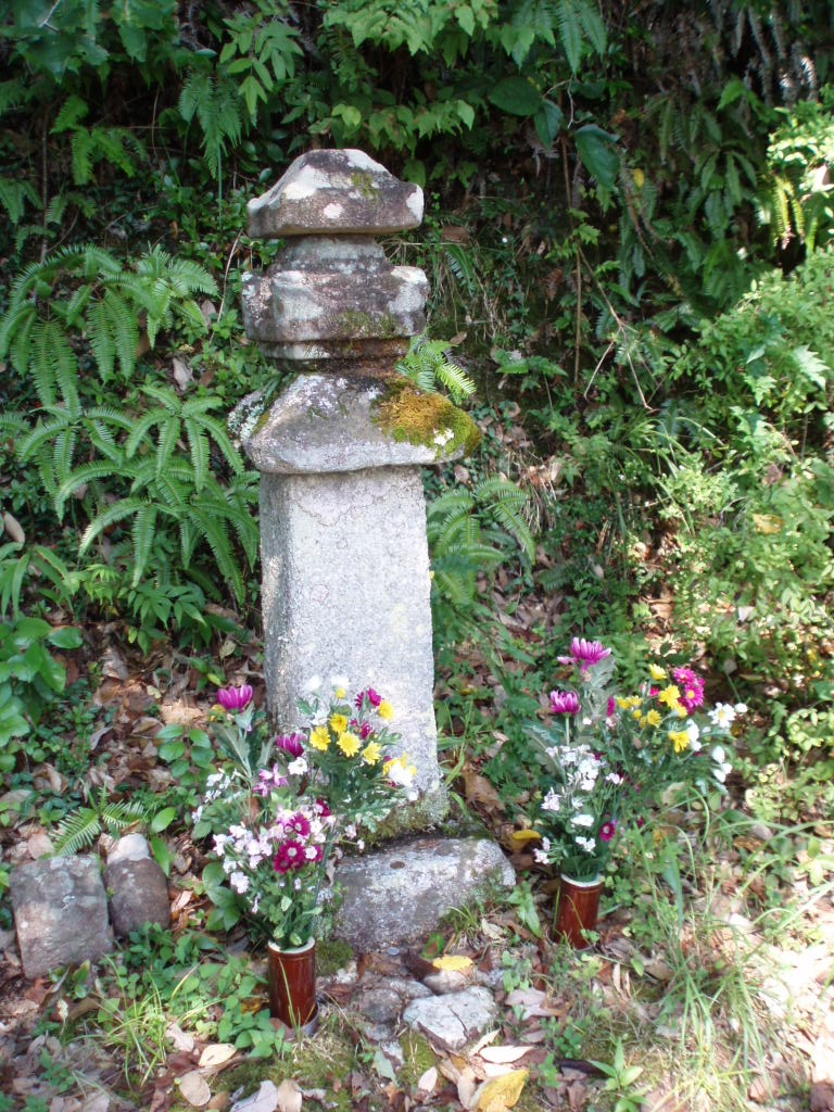 Izumi-Shikibu memorial monument